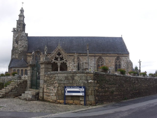 Église et croix